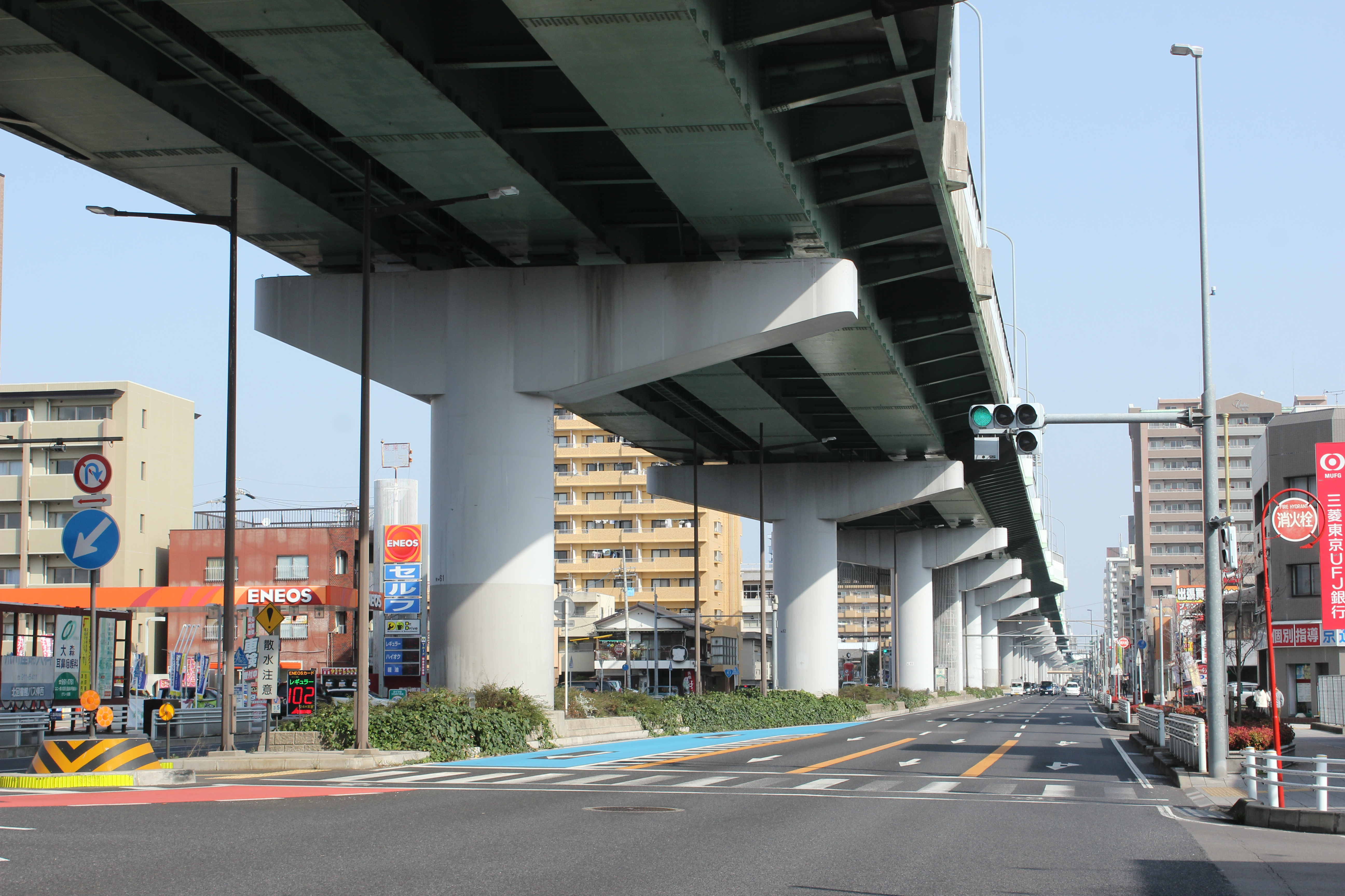 名古屋高速1号楠線 萩野通1丁目南交差点。かつて萩野出入口があった場所。